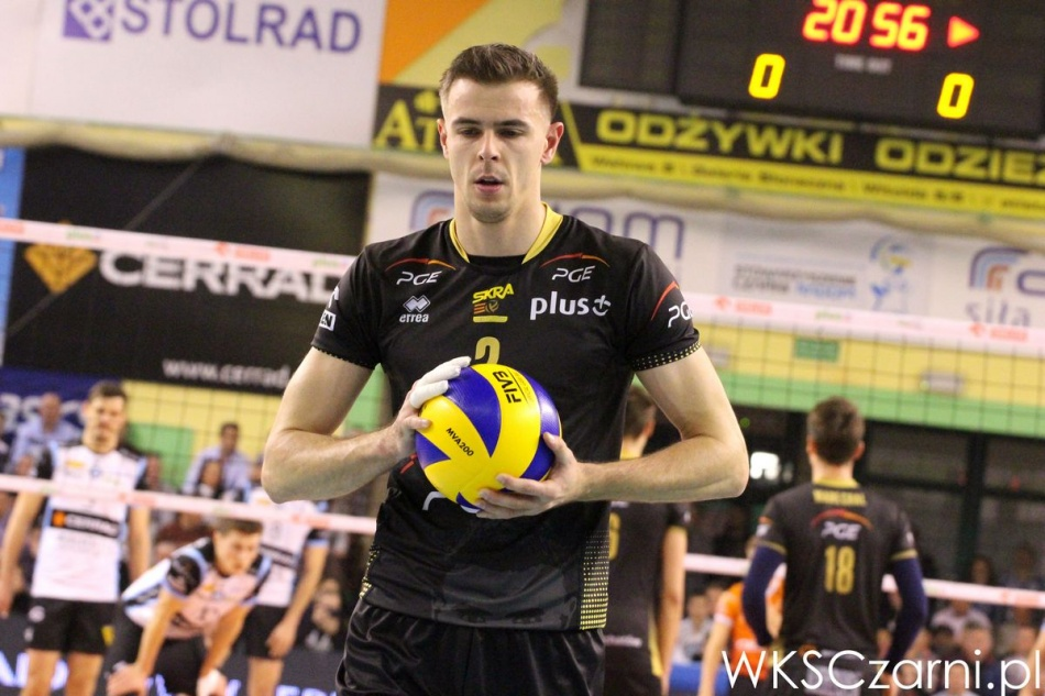 Mariusz Wlazły - polski siatkarz, atakujący. Sezon 2014-15